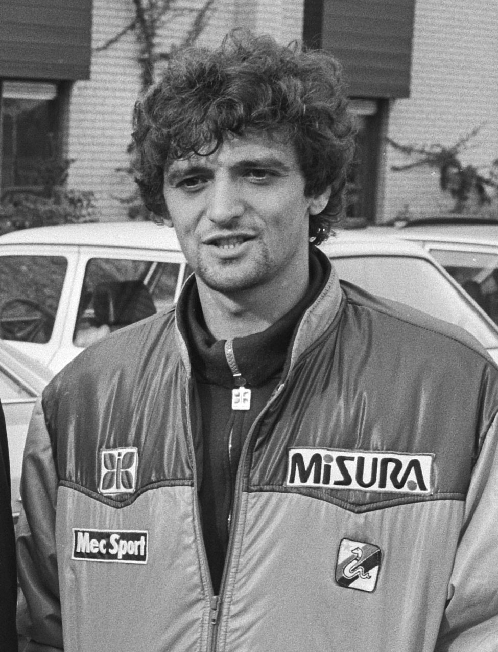 Heilo, Noord-Holland. Inter Milaan in Motel Heilo. Alessandro Altobelli.